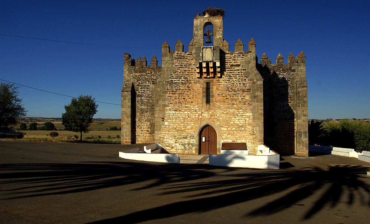 Capela da Boa Nova - Terena